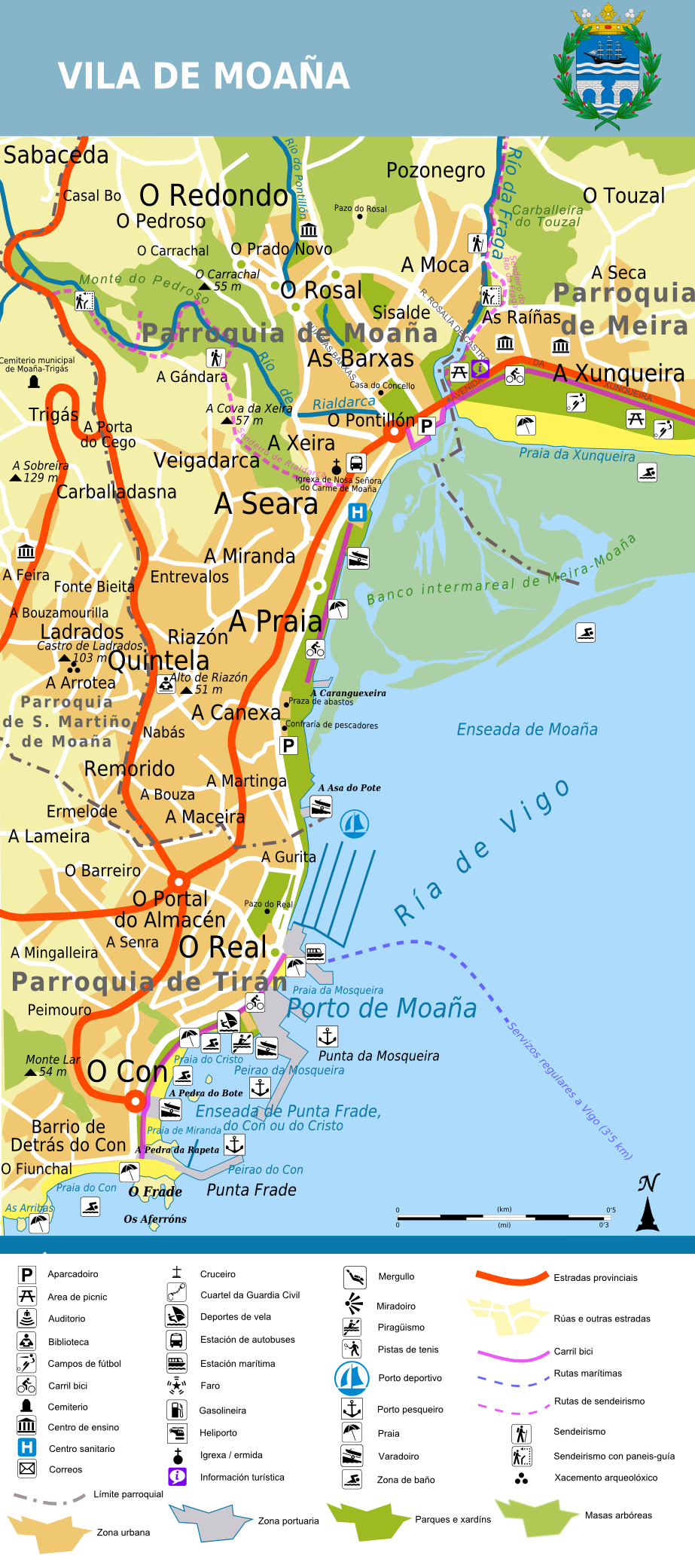 Plano de la villa de Moaña, comarca del Morrazo, provincia de Pontevedra, Galicia, España